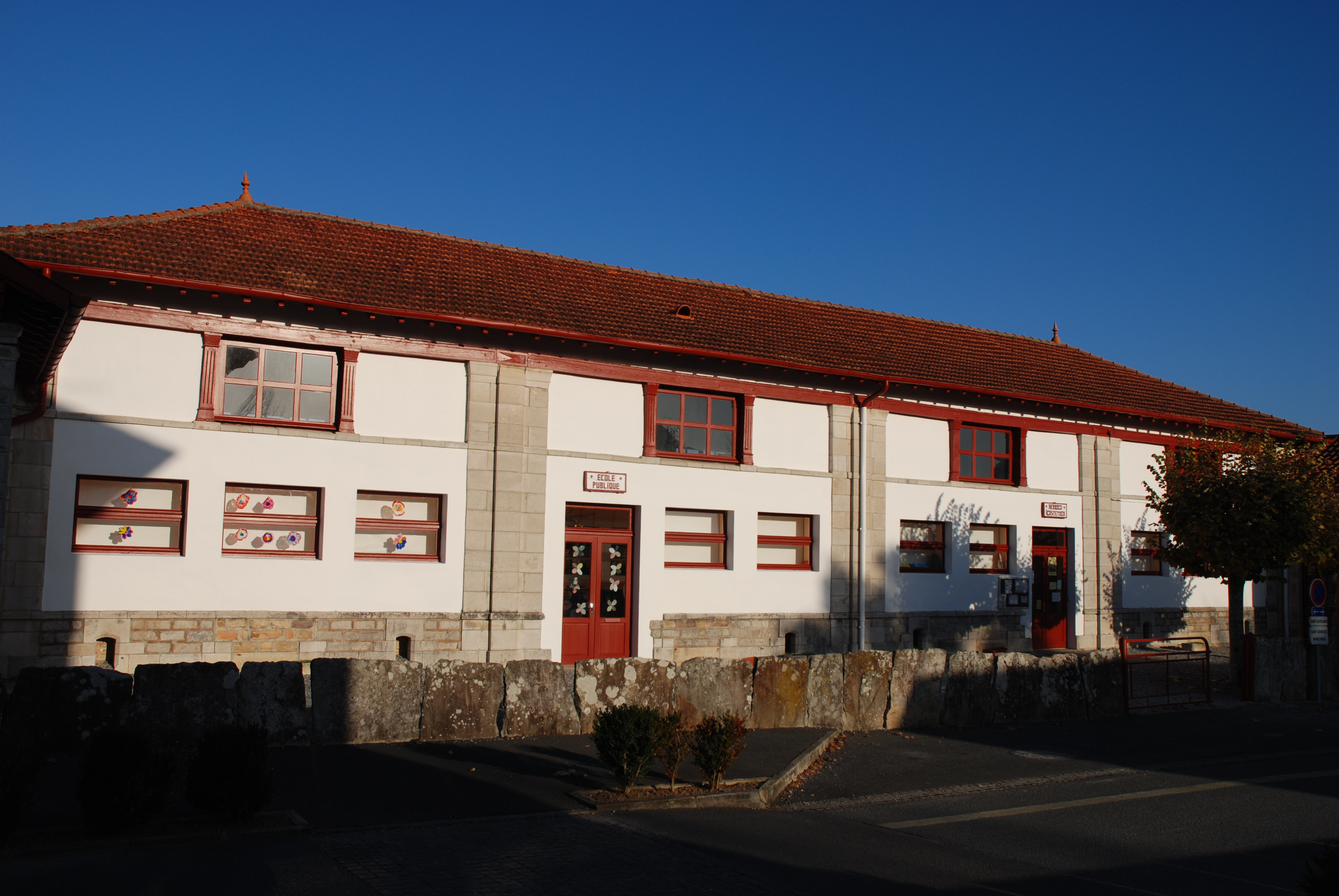 Sare, l'école primaire